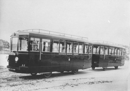 Automotrici TPC